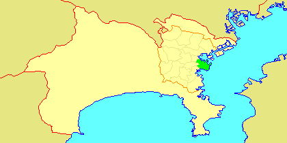 Map of Naka-ku, Yokohama, Kanagawa-prefecture, Japan